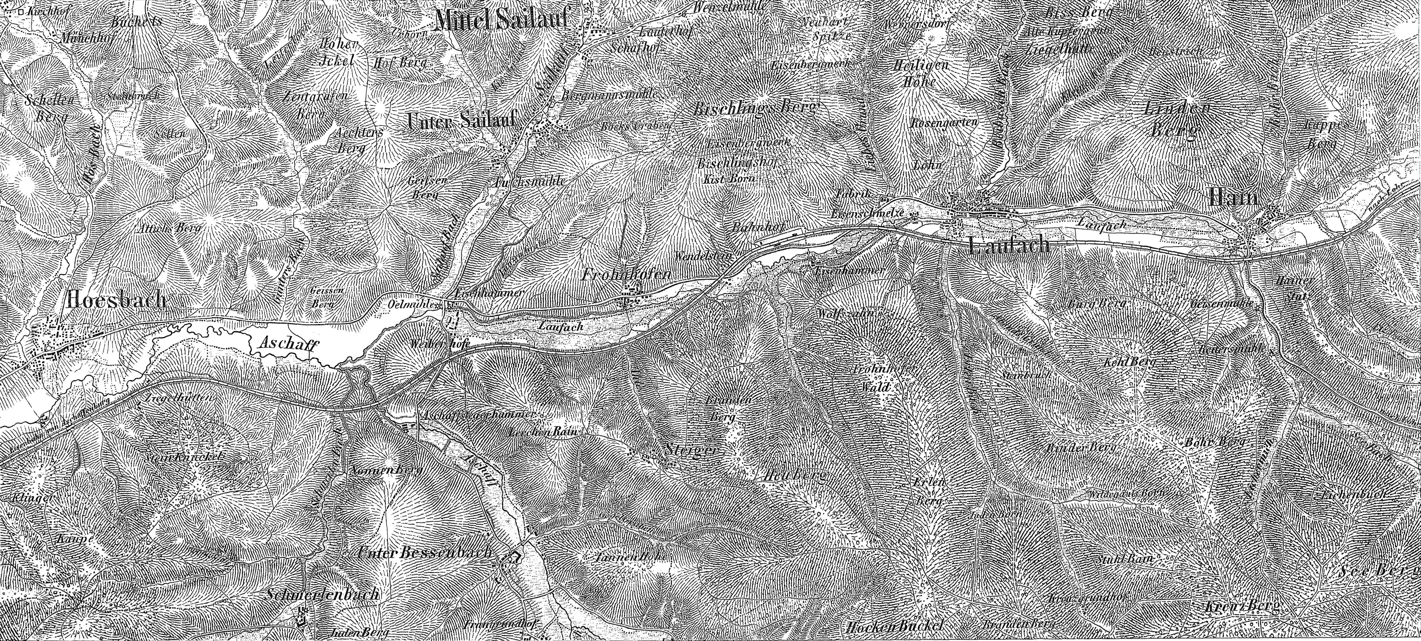 Plan zum Gefecht bei Laufach-Frohnhofen